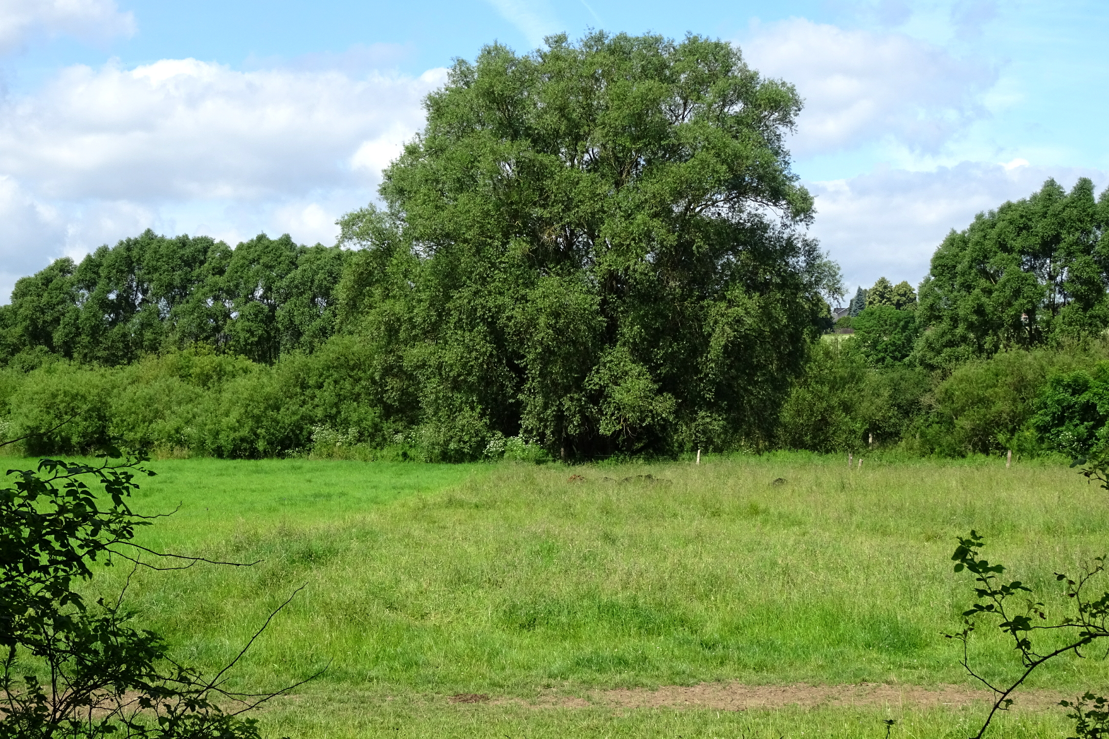 Naturschutzgebiet HA 129 Leineaue unter dem Rammelsberg